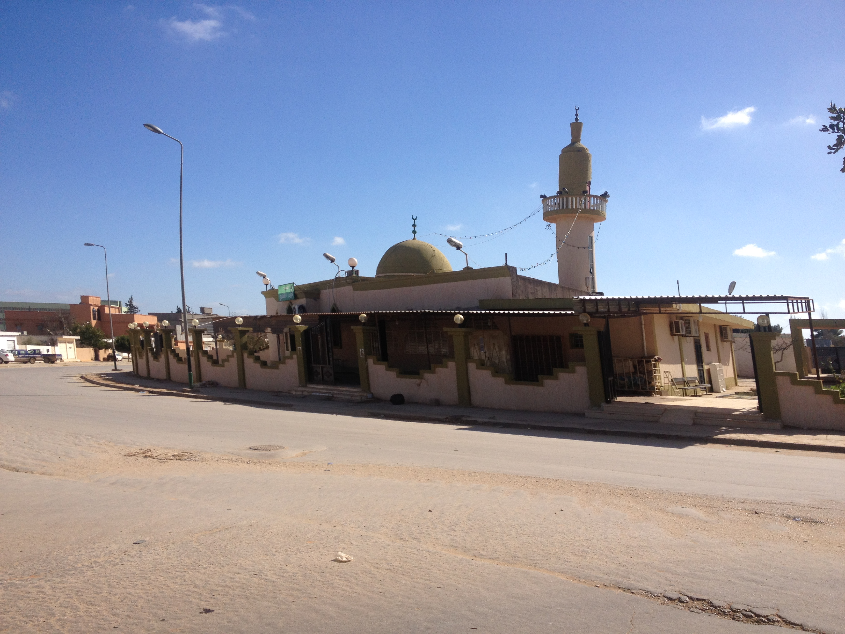 Abi Zar al Ghifari (أبي ذر الغفاري) mosque, Al Marj.